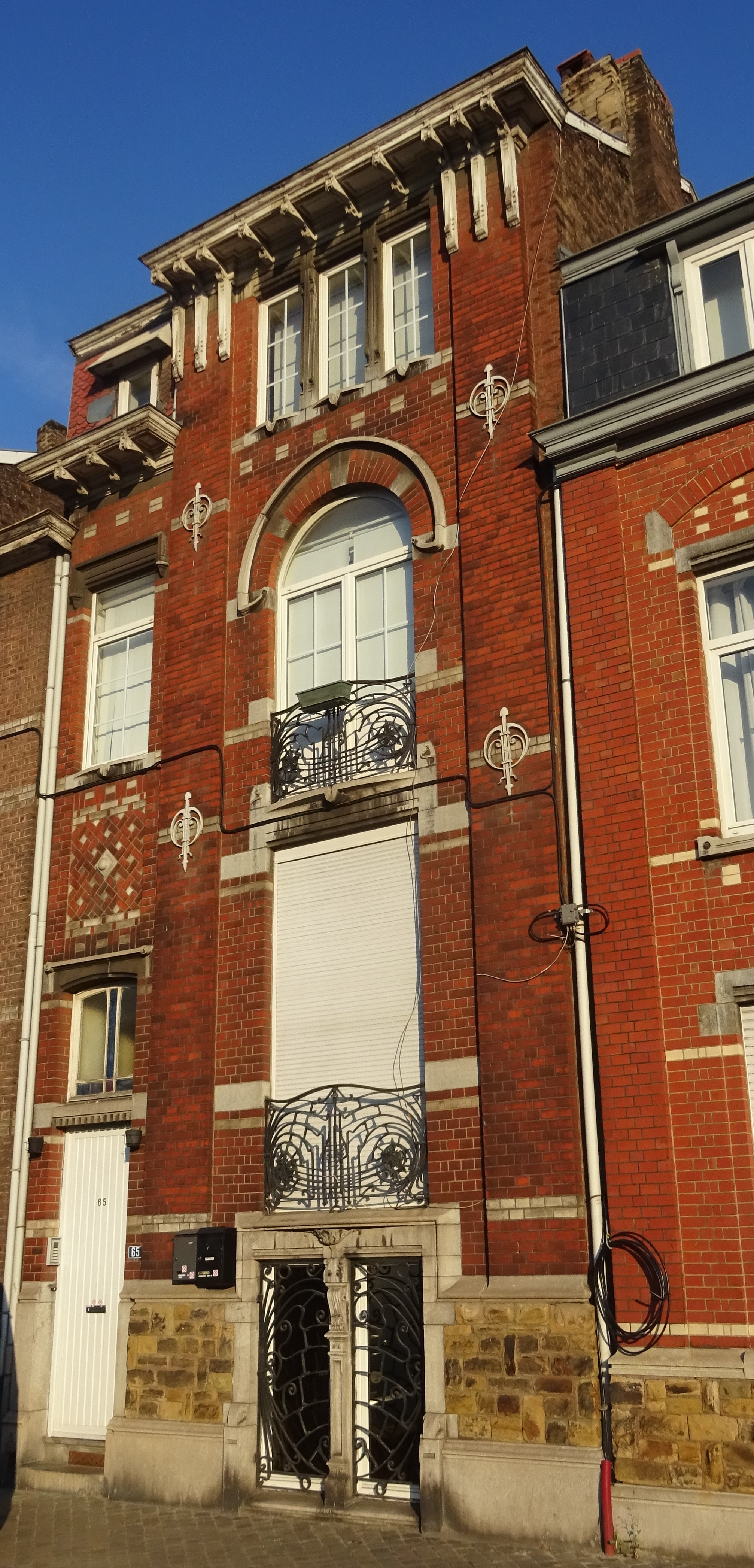 Séquence Devignée, Art nouveau, Liège